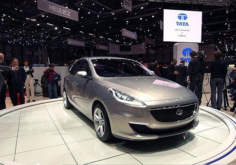 Tata Prima au Salon de Genève 2009